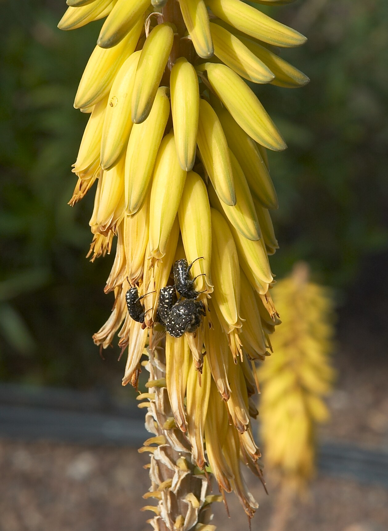 Aloe vera in Playa del Inglés, Gran Canaria, Spain